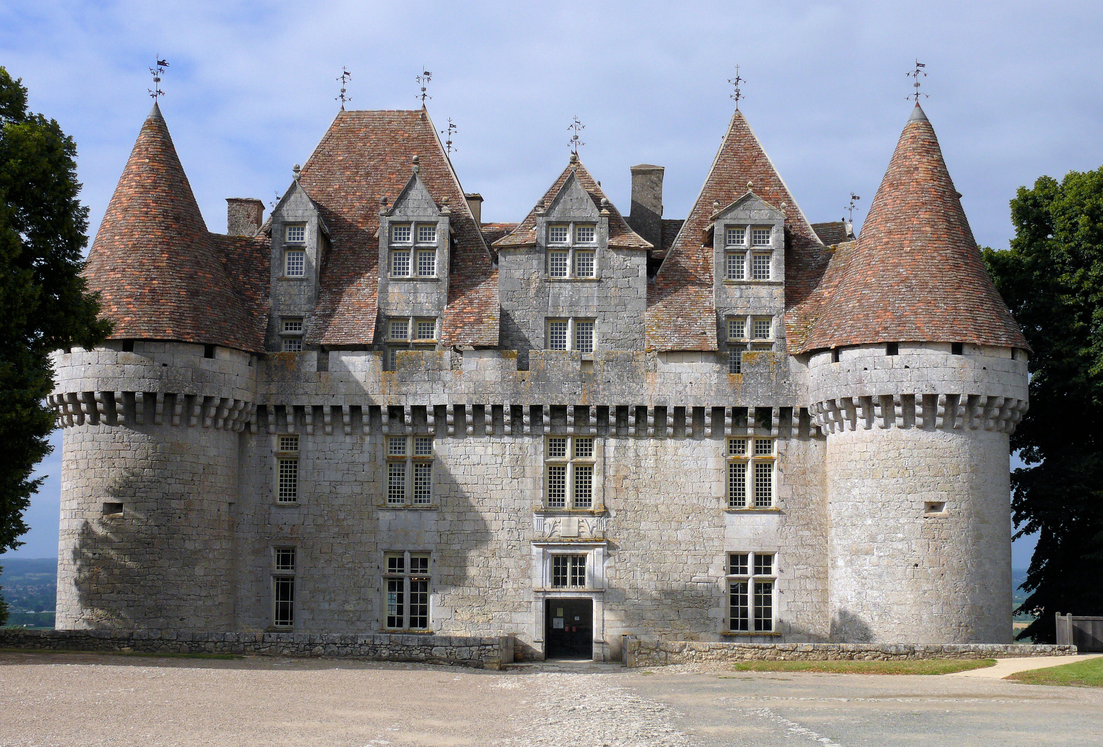 Château de Monbazillac -1